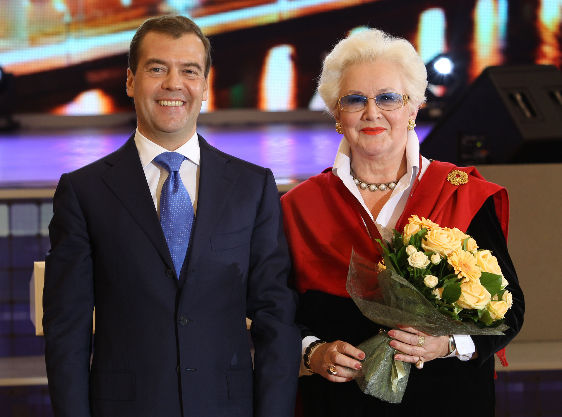 Награждение Президентом Р.Ф. Д. Медведевым А.Н. Шатиловой Орденом за заслуги перед Отечеством III степени